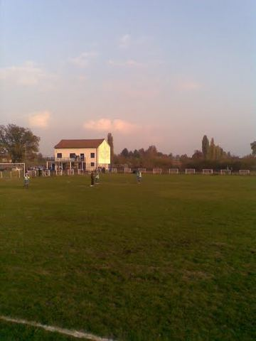 Стадион ФК Младост Јабучки Рит. Аутор OgiPFC